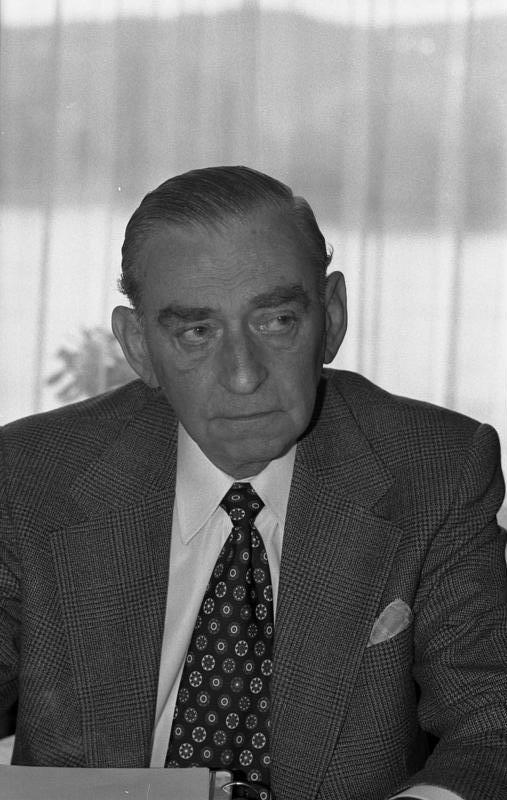 XXII Ordentlicher Kongreß der Europa-Union Deutschland im Rheinhotel Deesen, Bad Godesberg (Ludwig Rosenberg)